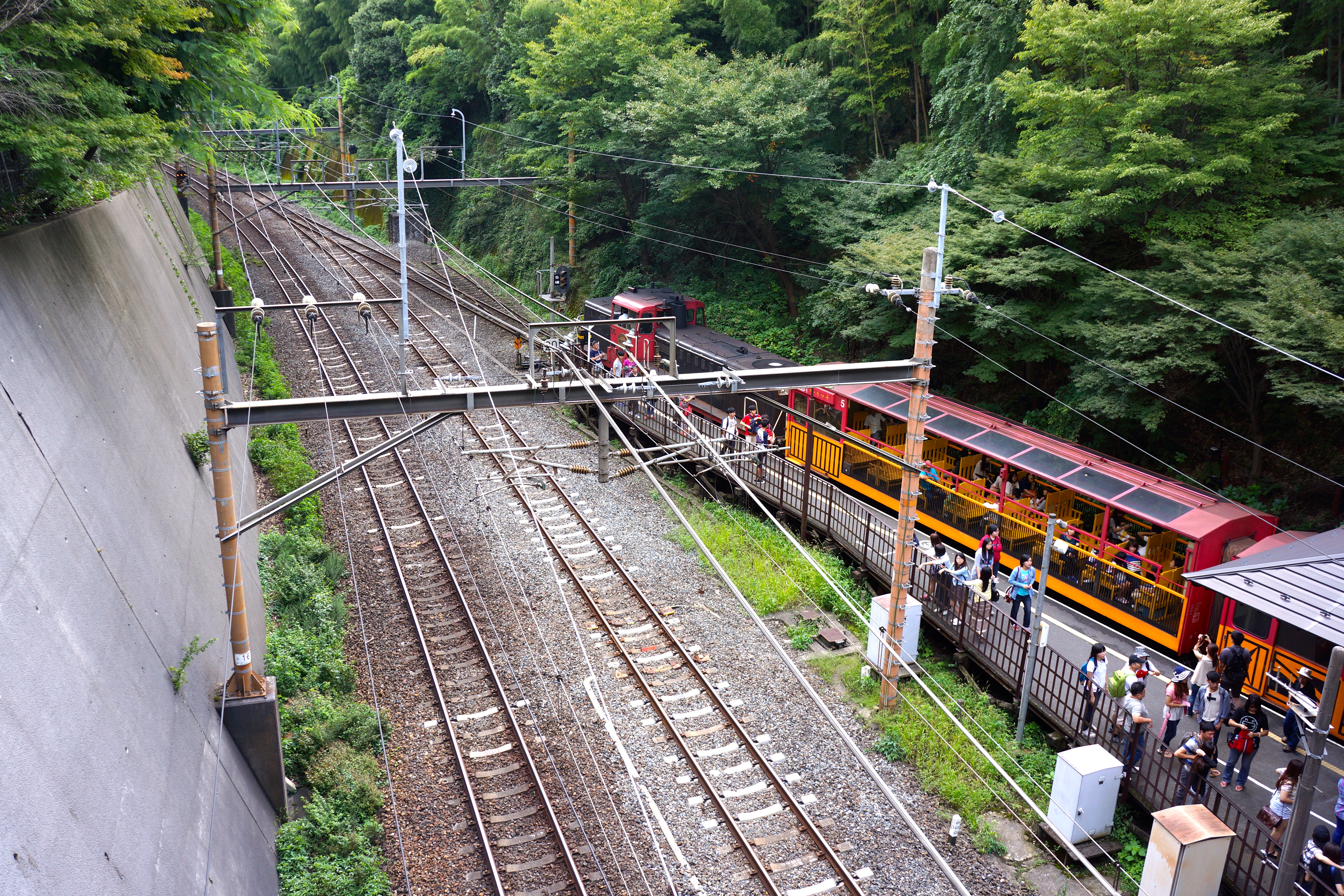 嵯峨野観光鉄道 Arashiyama, Kyoto